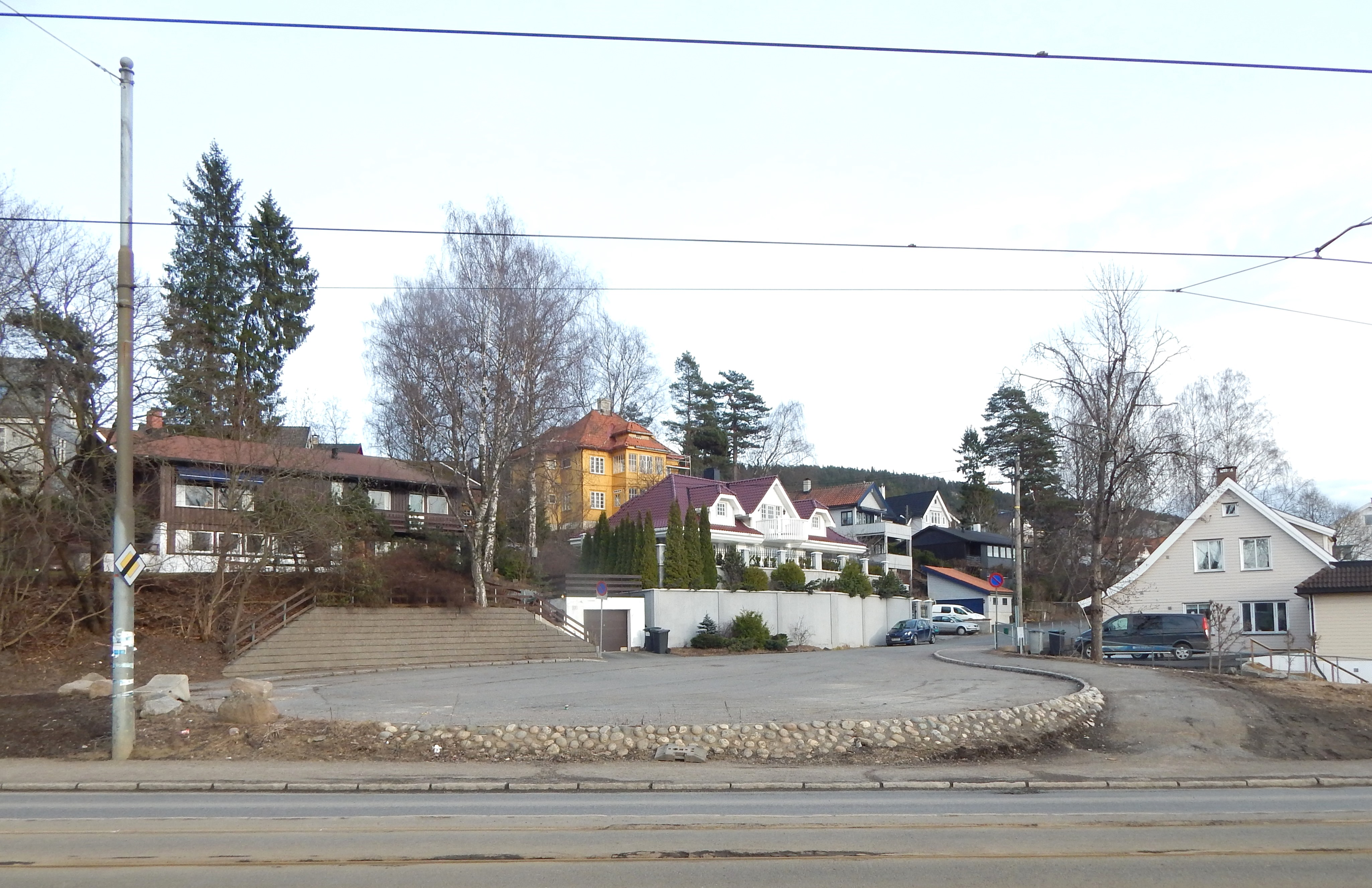 En del av Kjelsåsveien ender i en snuplass på østsiden av Grefsenveien.